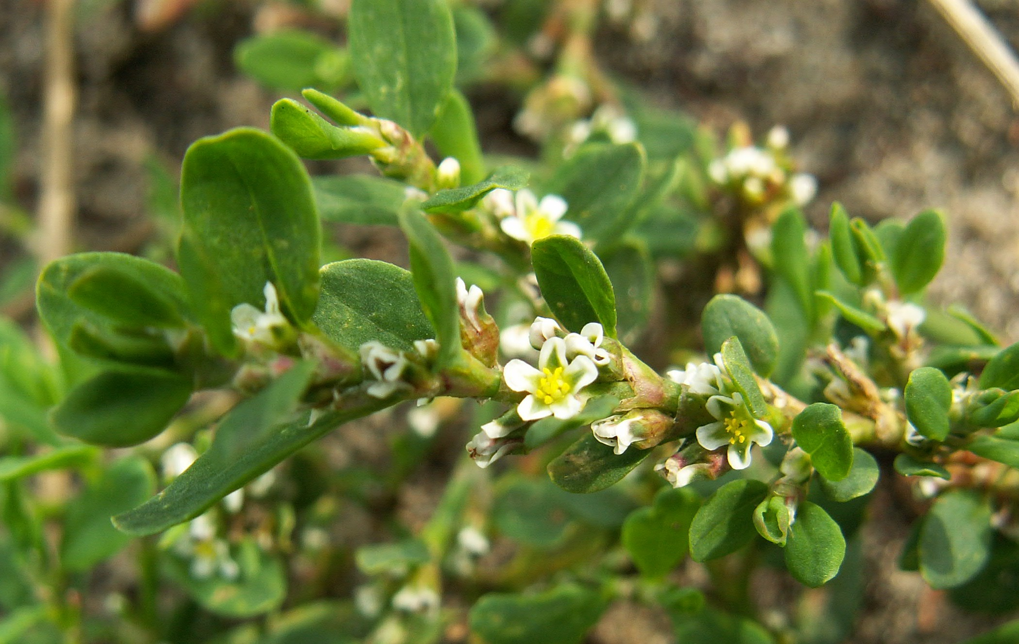 Polygonum aviculare, flower. Szczecin Dąbie, NW Poland